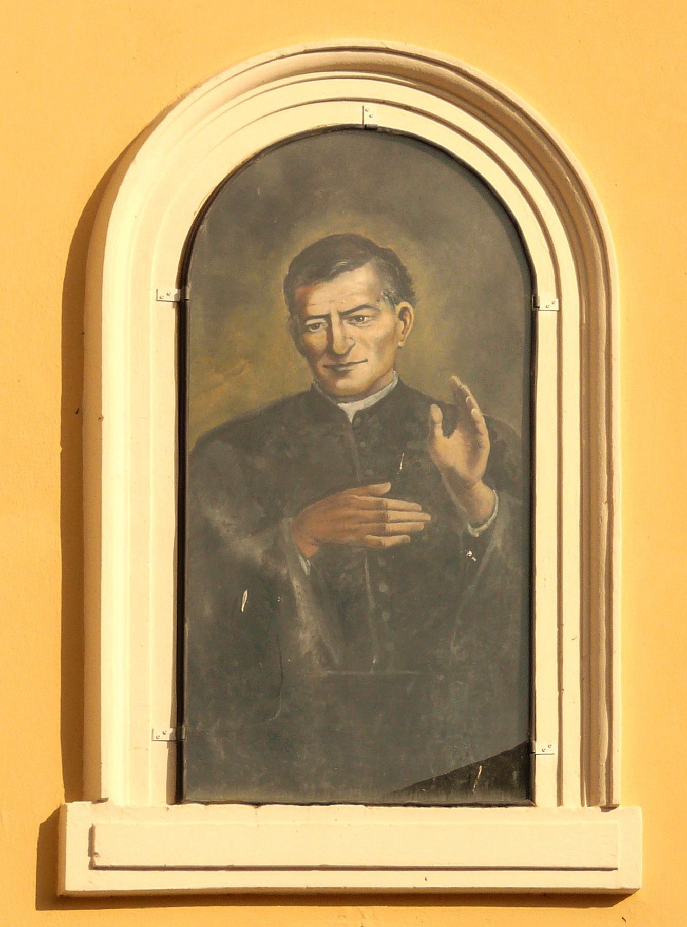 Chiesa di San Martino, Dipinto di sant'Antonio Roscelli, Bargone, Liguria, Italia